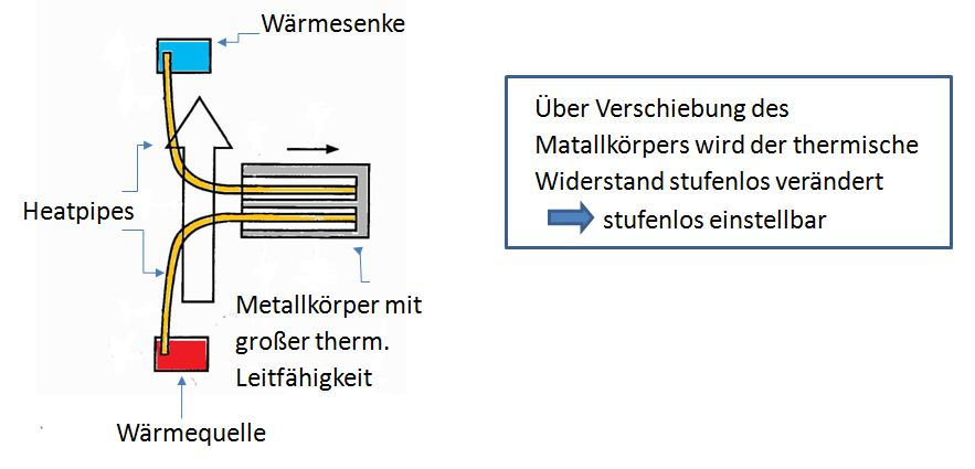 Externe Steuerung zweier gekoppelter Heatpipe über einen verstellbaren Metallkörper.